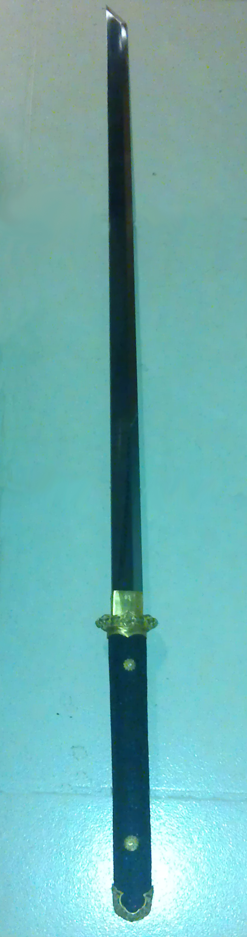 壬辰龍年七月卅於津沽寒舍，今人復原唐代“寶刀”攝影